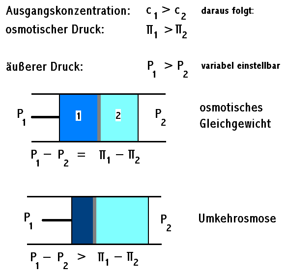 Bedingungen für das osmotische Gleichgewicht und die Umkehrosmose